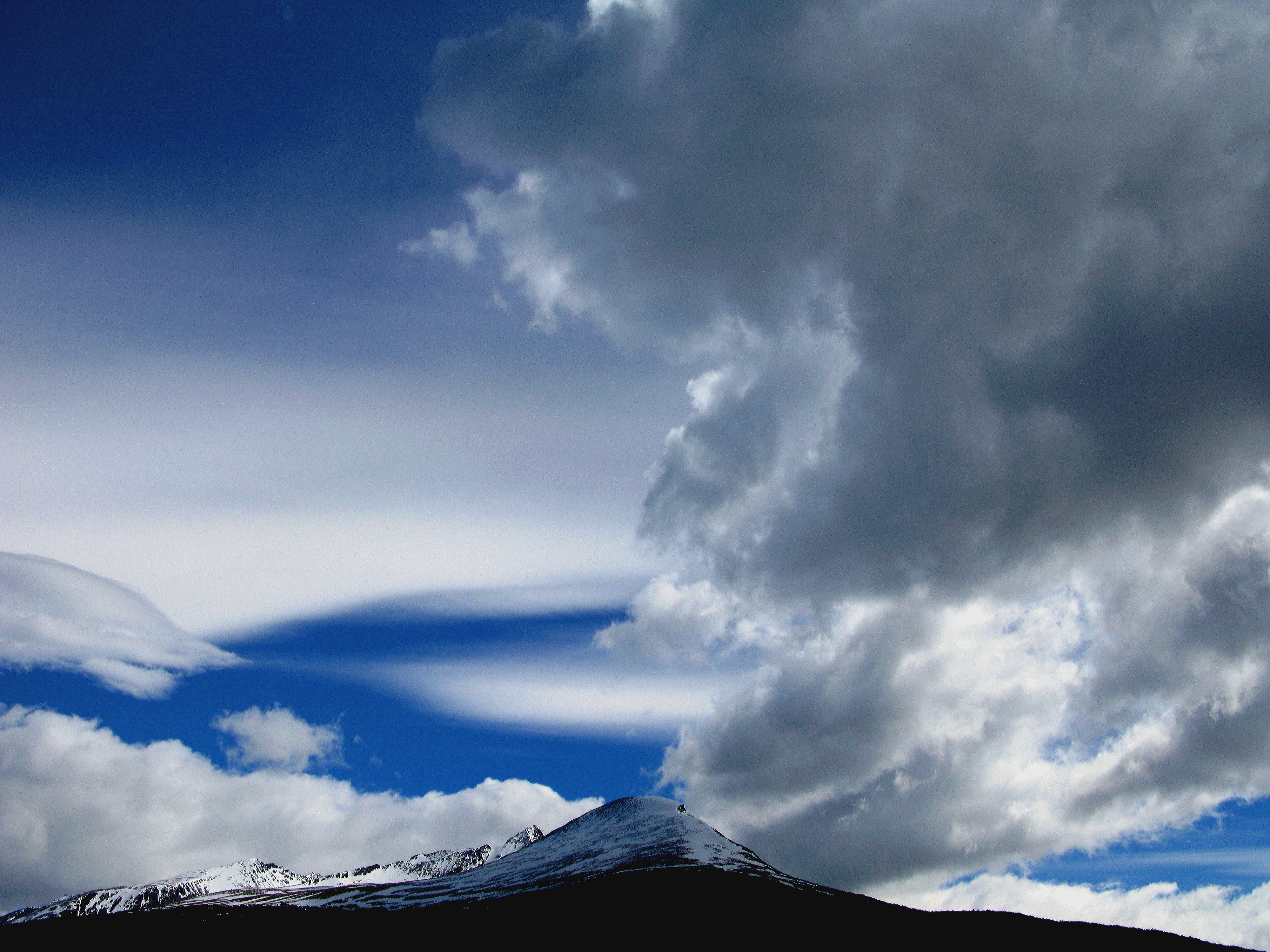 Vue sur le mont Condor